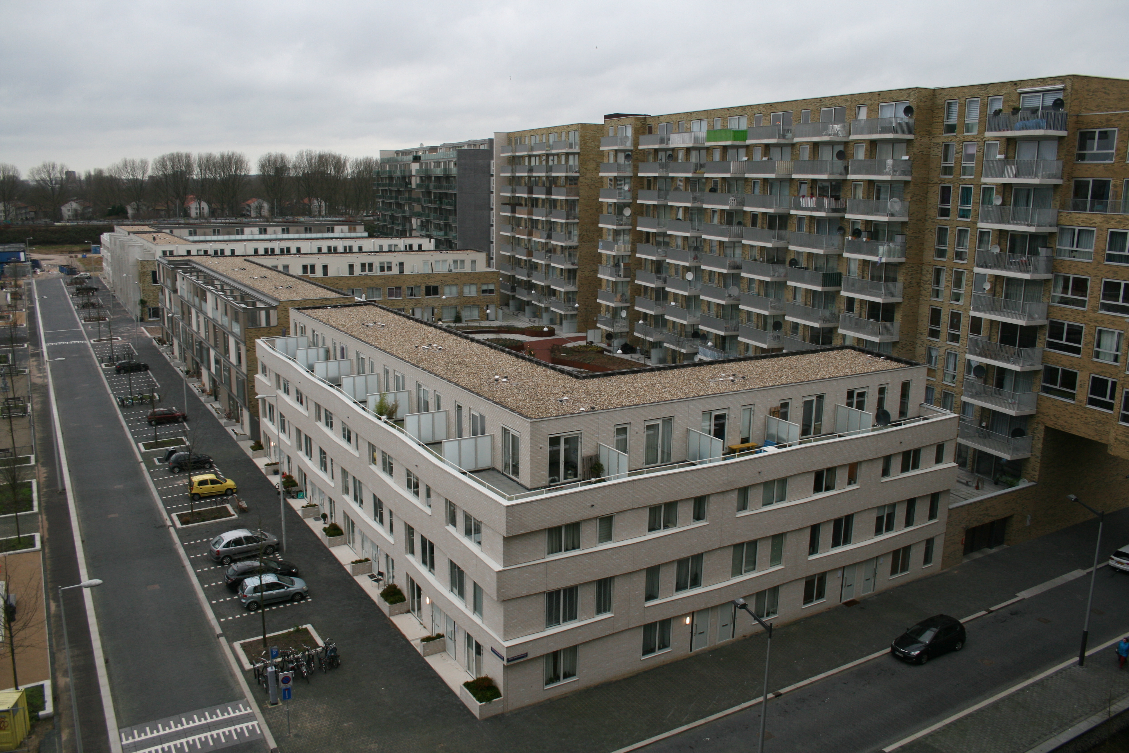 Woongebouwen langs de Fanny Blankers-Koenlaan, Amsterdam Bos en Lommer, 31 december 2012.